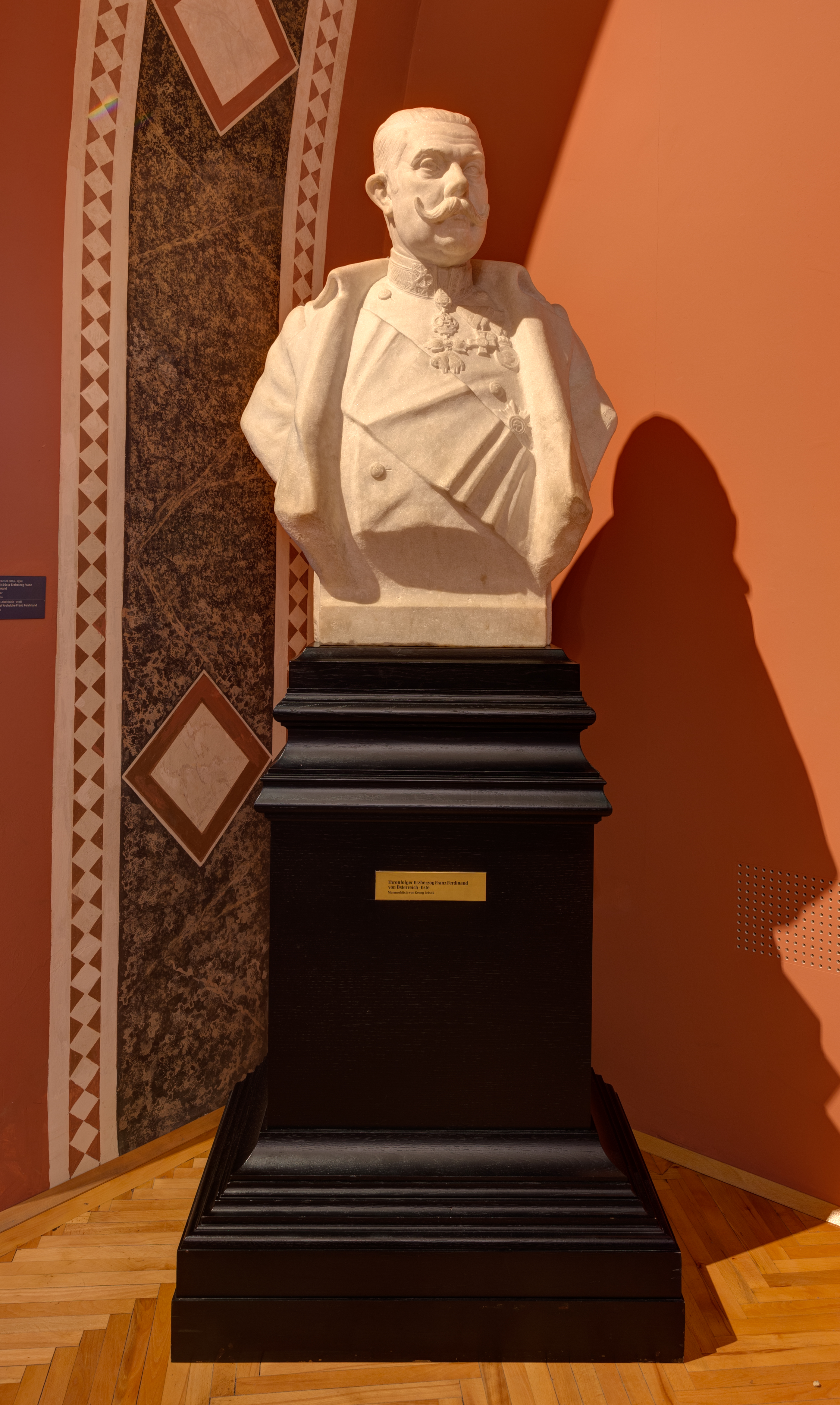 Porträt des Thronfolger von Österreich-Ungarn, Erzherzog Franz Ferdinand (1863-1914) als Kaiser (1863-1914)